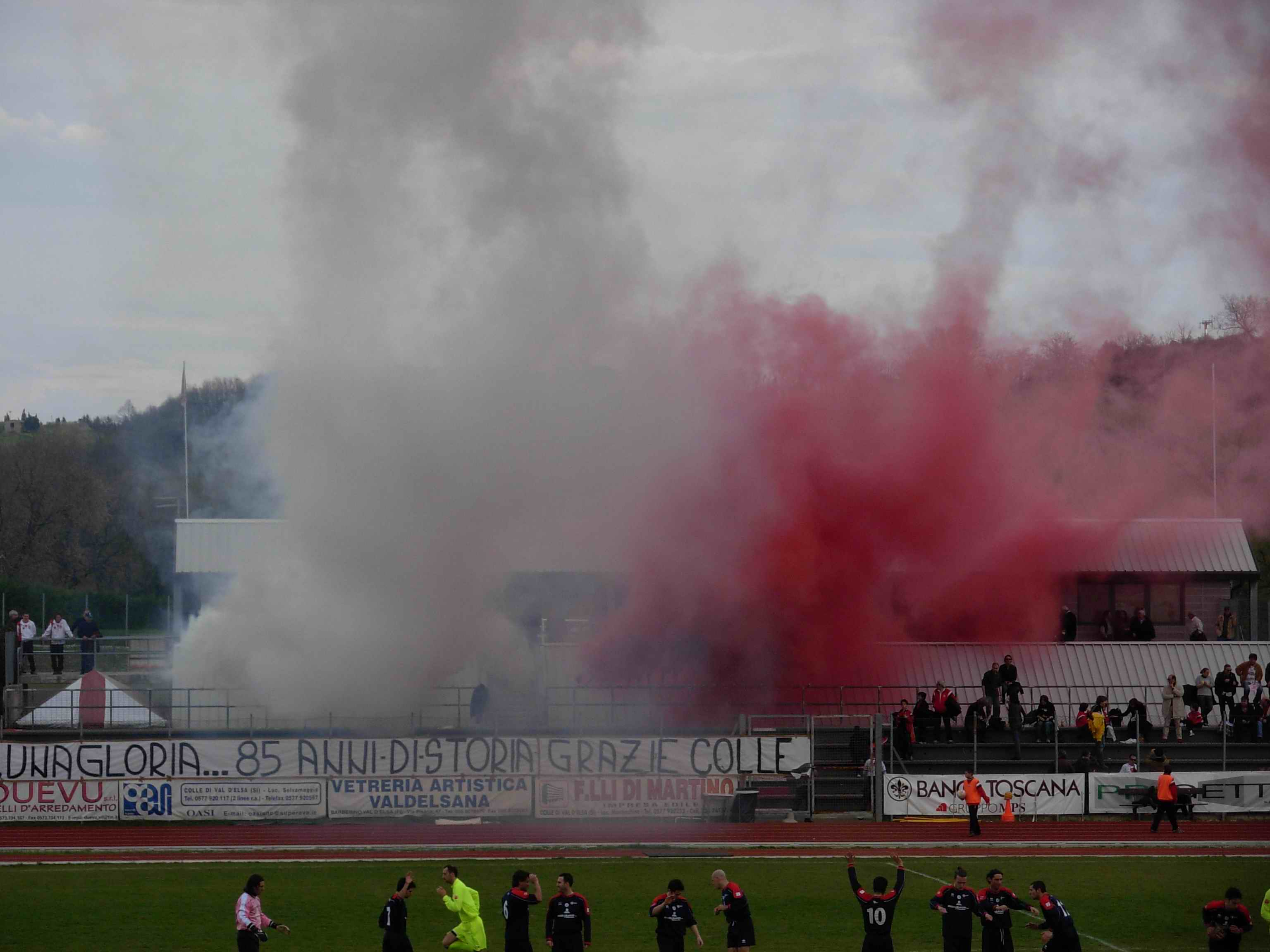 Colle di Val d'Elsa - Colligiana: Festa per la promozione della Colligiana in Serie D